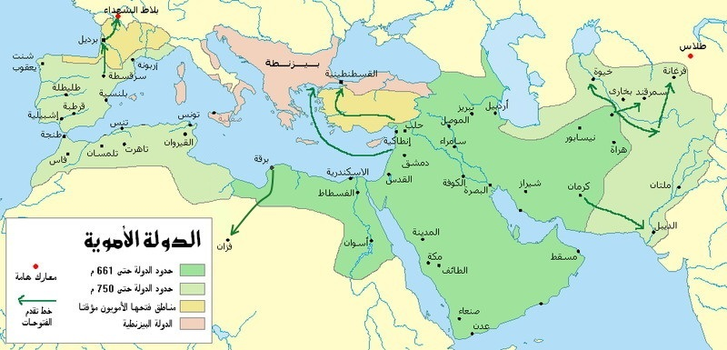 خارطة الدولة الأموية